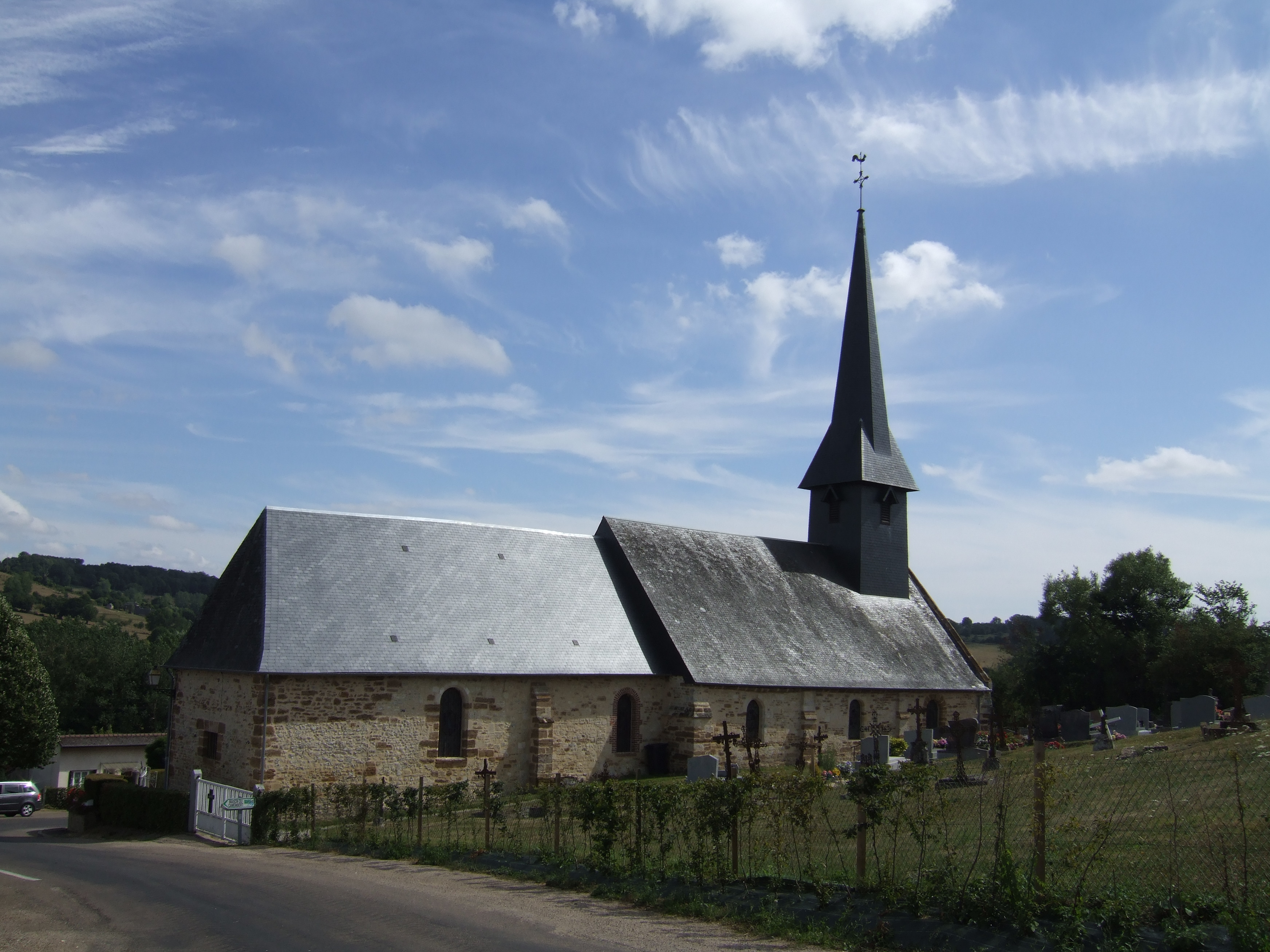 Eglise de Camembert (Orne, Normandie, France)